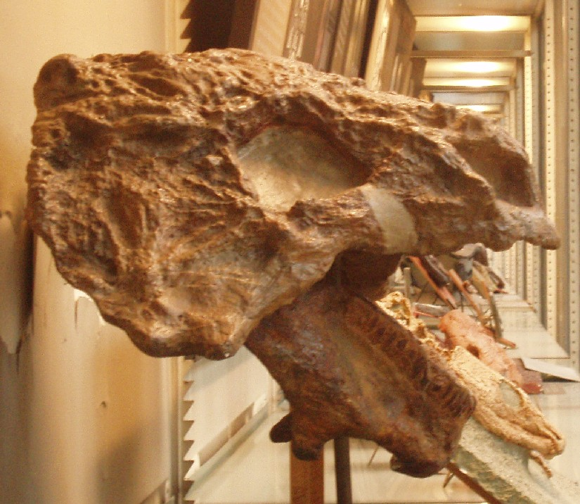 Scutosaurus.